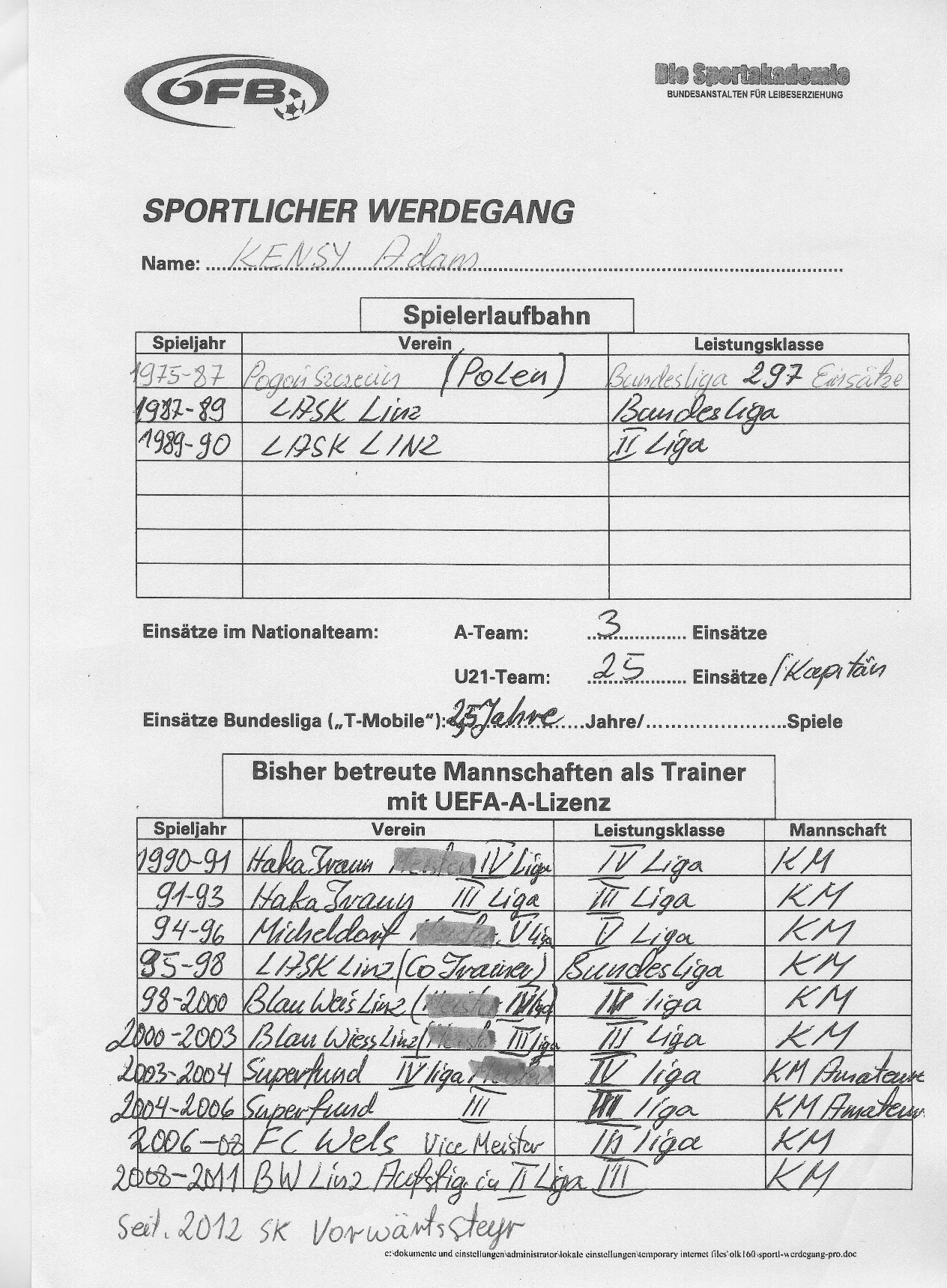 Werdegang